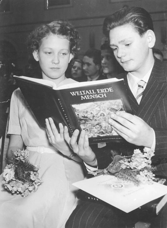 Dresden, Jugendweihe, Buchgeschenk Zentralbild Höhne-Pohl Bn-Ho. 6.3.1956 Die ersten Jugendweihen 1956 in Dresden In Dresden fanden am 4.3.1956 die ersten Jugendweihen in diesem Jahre statt. Für die Jugendlichen des IX. Stadtbezirkes war die Jugendweihe im Lichthof des Dresdner Rathauses ein Erlebnis. Intendant Krauss von den Landesbühnen Sachsen führte die Jungen und Mädel in ihren neuen Lebensabschnitt ein. UBz: Auch für Sigrid Meichsner und Heinz Meier ist die Jugendweihe ein Höhepunkt und ein neuer Abschnitt in ihrem Leben.